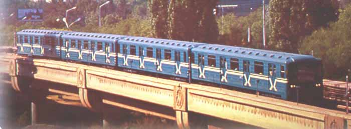 Métro de Tachkent